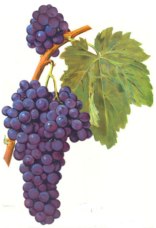 Grappe d'Oriou gris par Viala et Vermorel